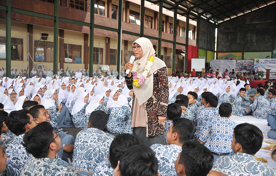 Netty saat di Tasikmalaya